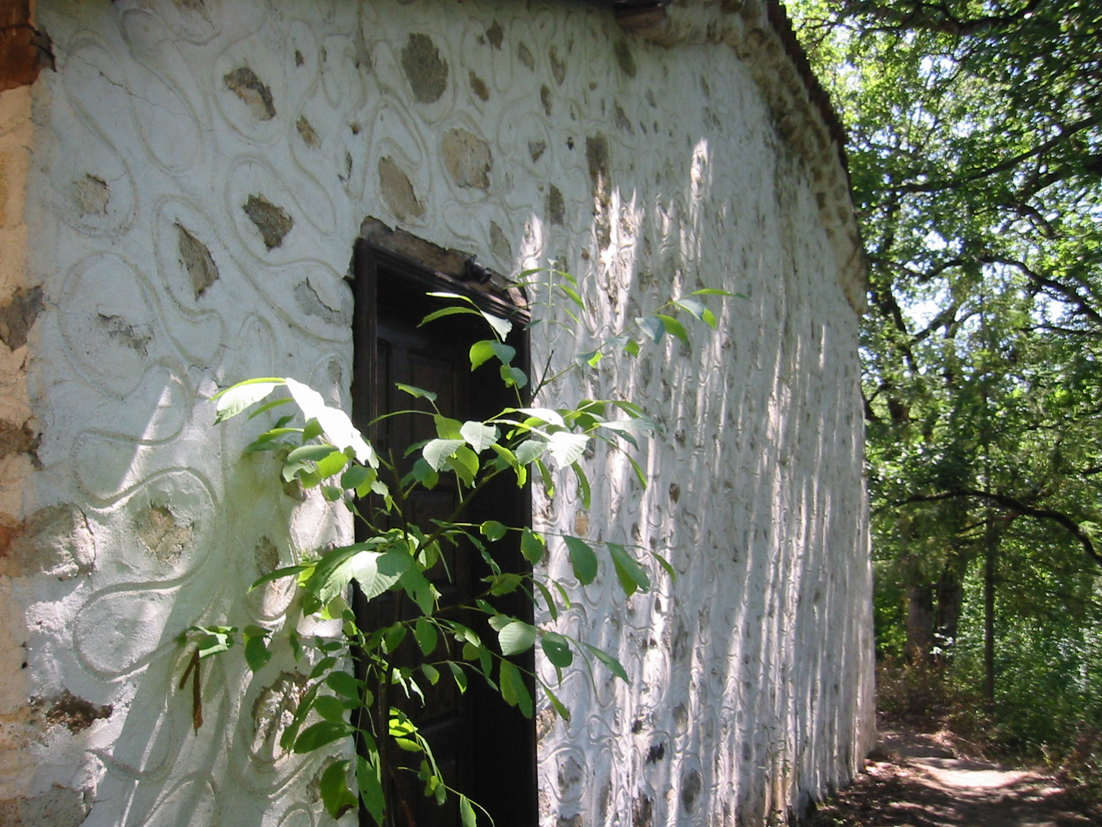 Kashina, Bulgarien, Der Eingang der alte Kirche. Gebaut ca. 1848.